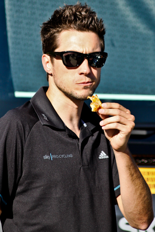 Etape 20 (Sestrière) du Tour d'Italie 2011